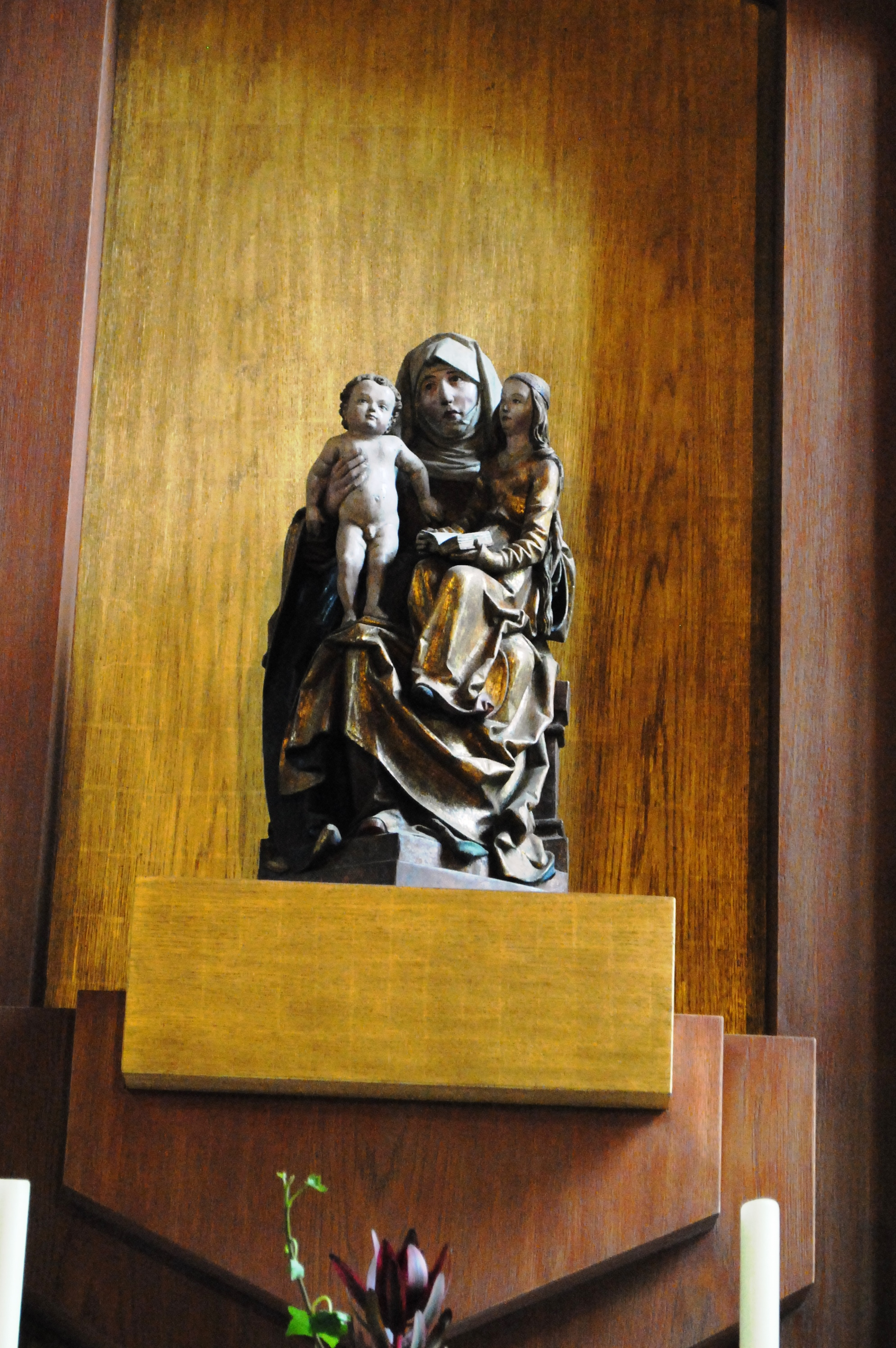 Anna selbdritt, Riemenschneiderschule, Maria im Weingarten, Volkach